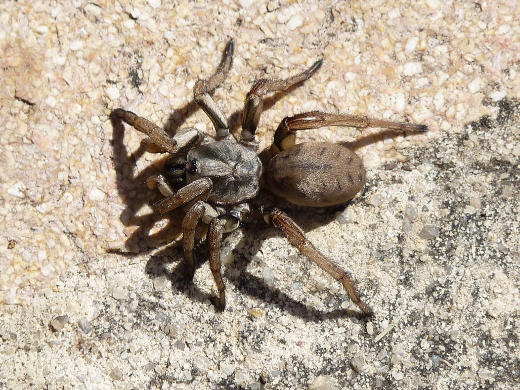 araignée, probablement : mygale, famille des Nemesiidae, genre Nemesia. Photo prise sur la côte varoise (France)